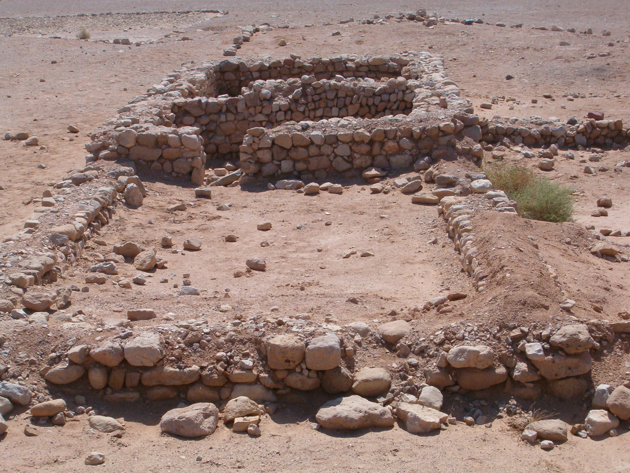 שרידי מבנים עתיקים בעברונה.